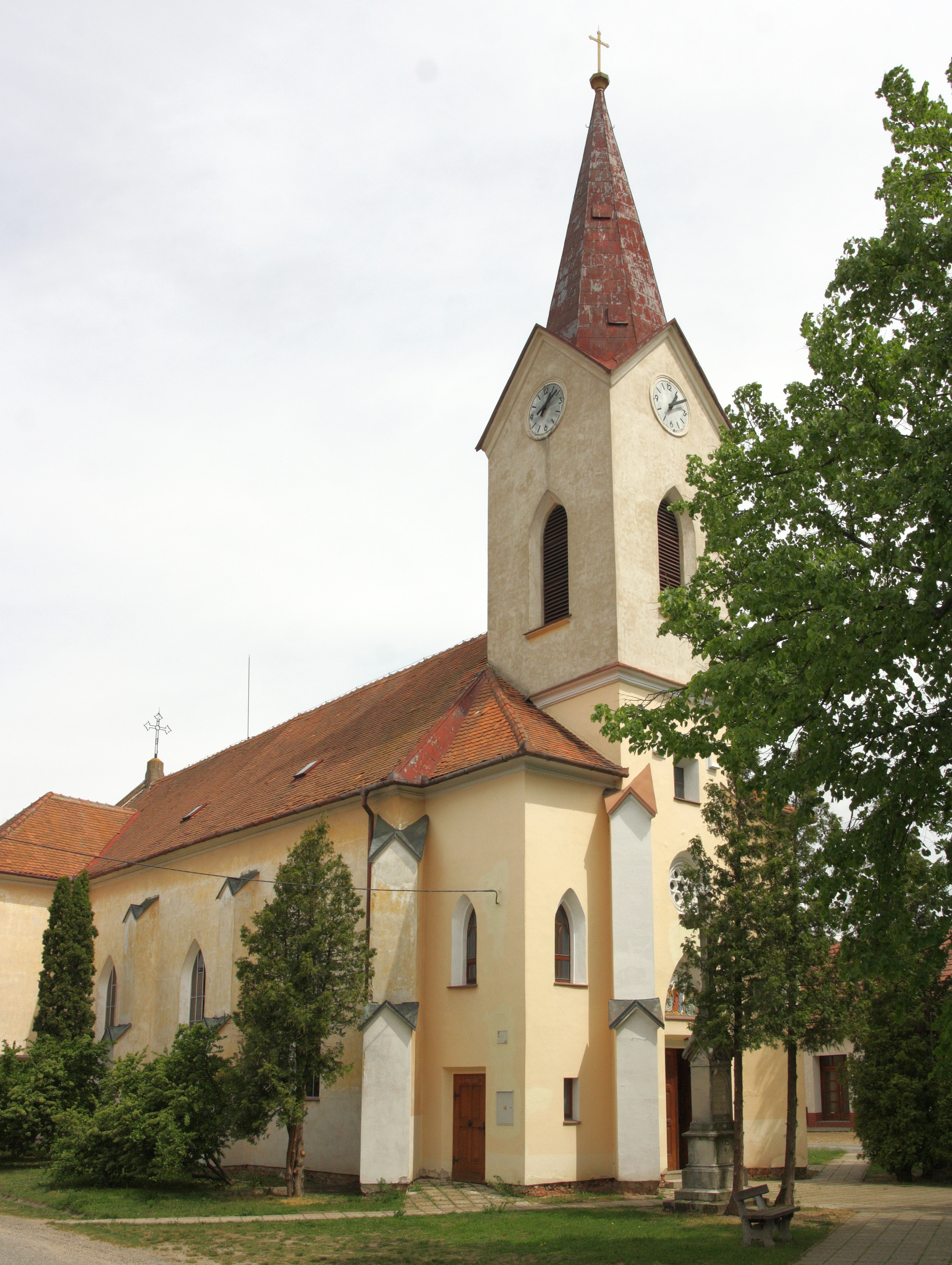 Přísnotice - kostel sv. Václava.